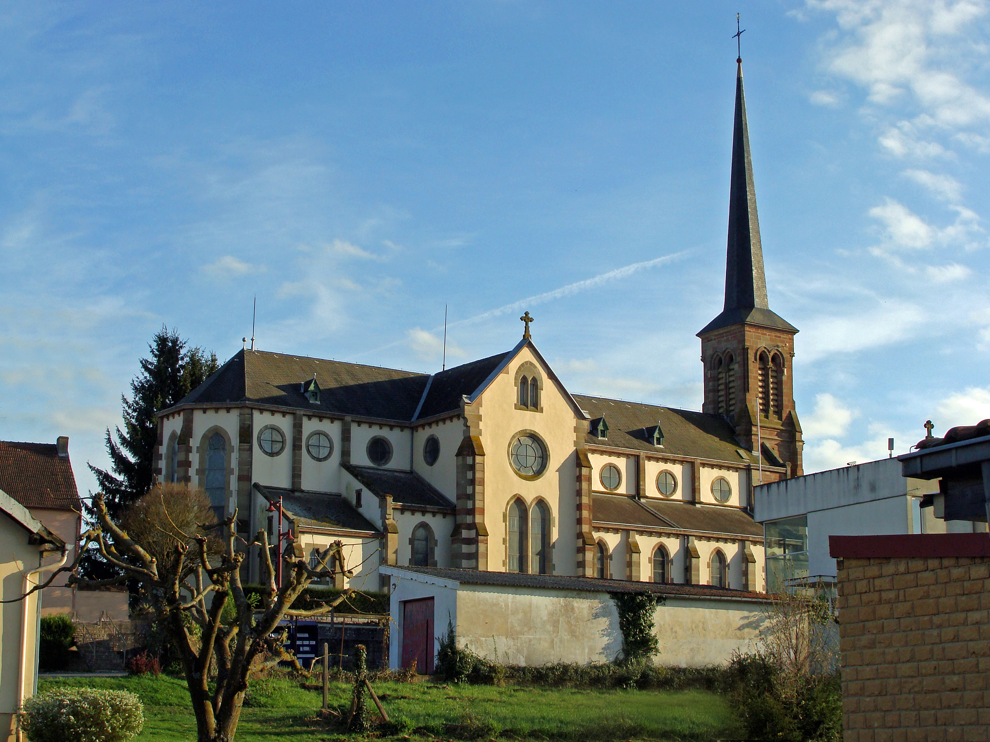 Église de l'Immaculée-Conception (1869) de Holving (Moselle). Style néogothique.